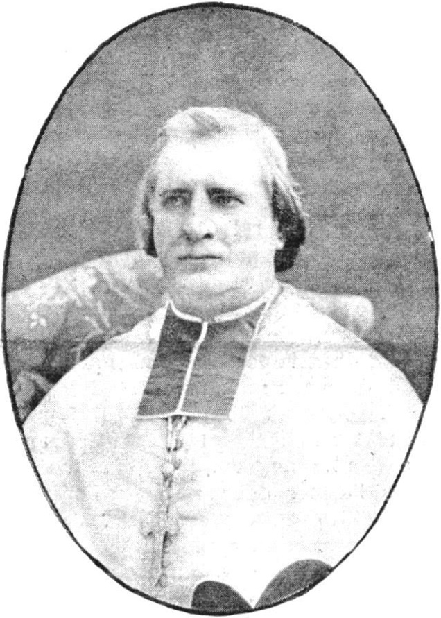 "Mgr Fava."